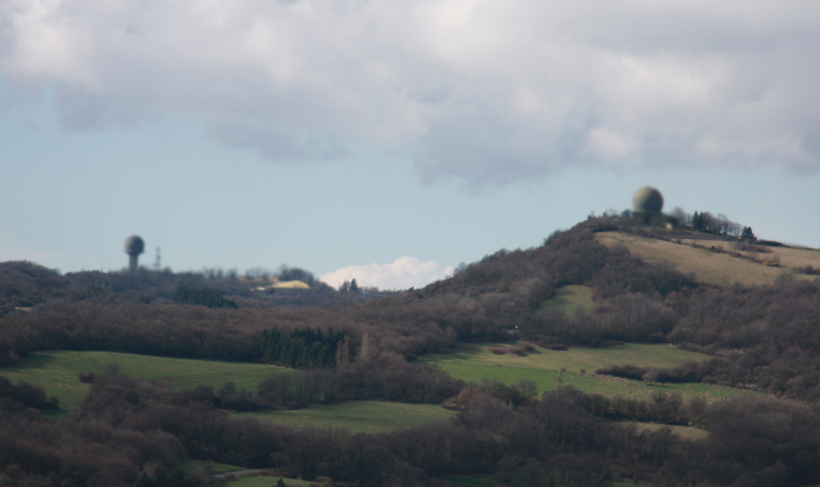 Les radars "palmier" à droite et le "23 cm" à gauche qui se trouvent au sommet du Mont Thou et du Mont Verdun, photo prise du Mont Cindre, aux environs de Lyon